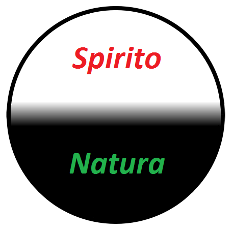 Schema dell'Assoluto secondo Schelling: Spirito e Natura